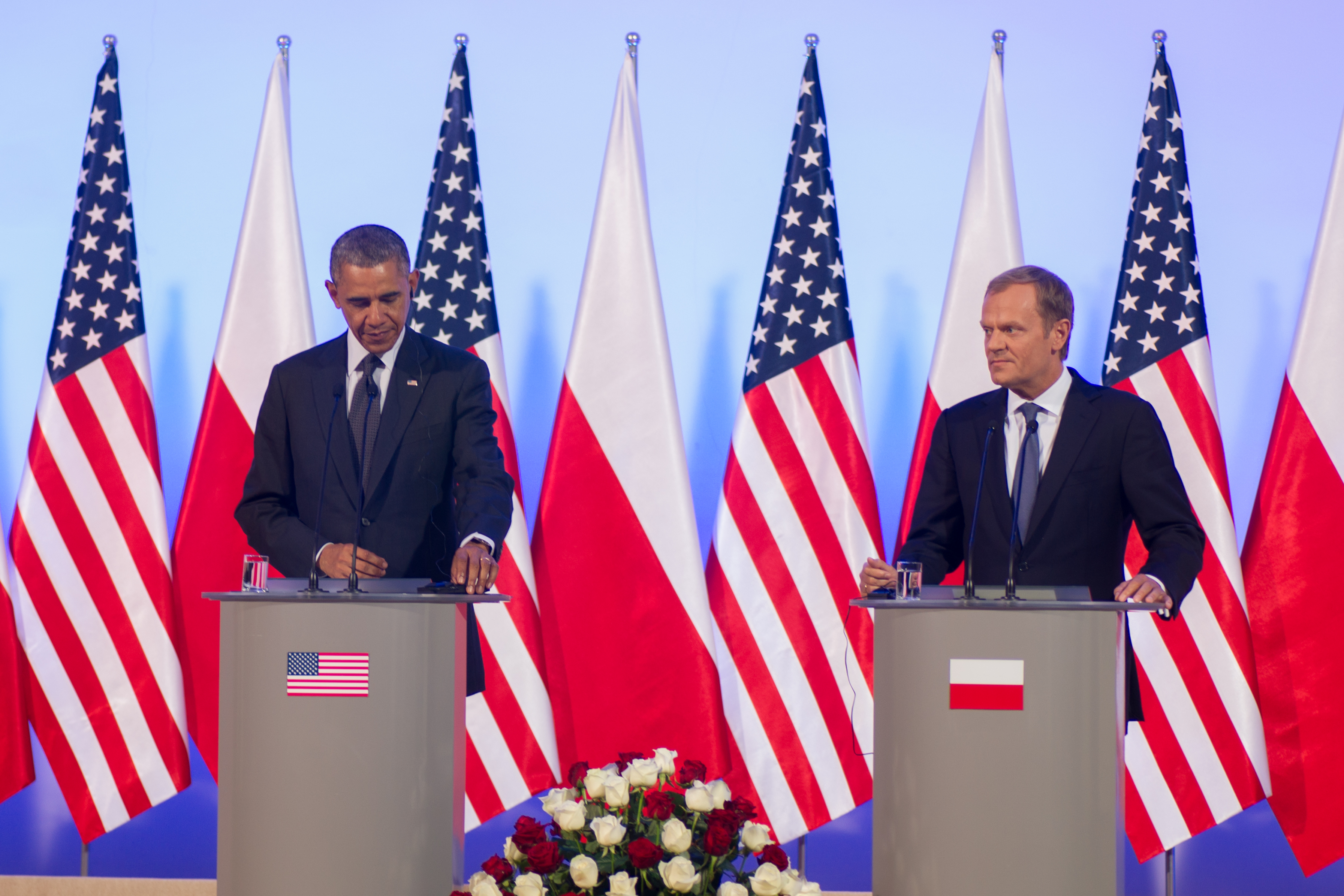 Poland 25th Anniversary of Freedom - with President Barack Obama, President Bronisław Komorowski and Prime Minister Donald Tusk - 4 June 2014 - Warsaw, Poland